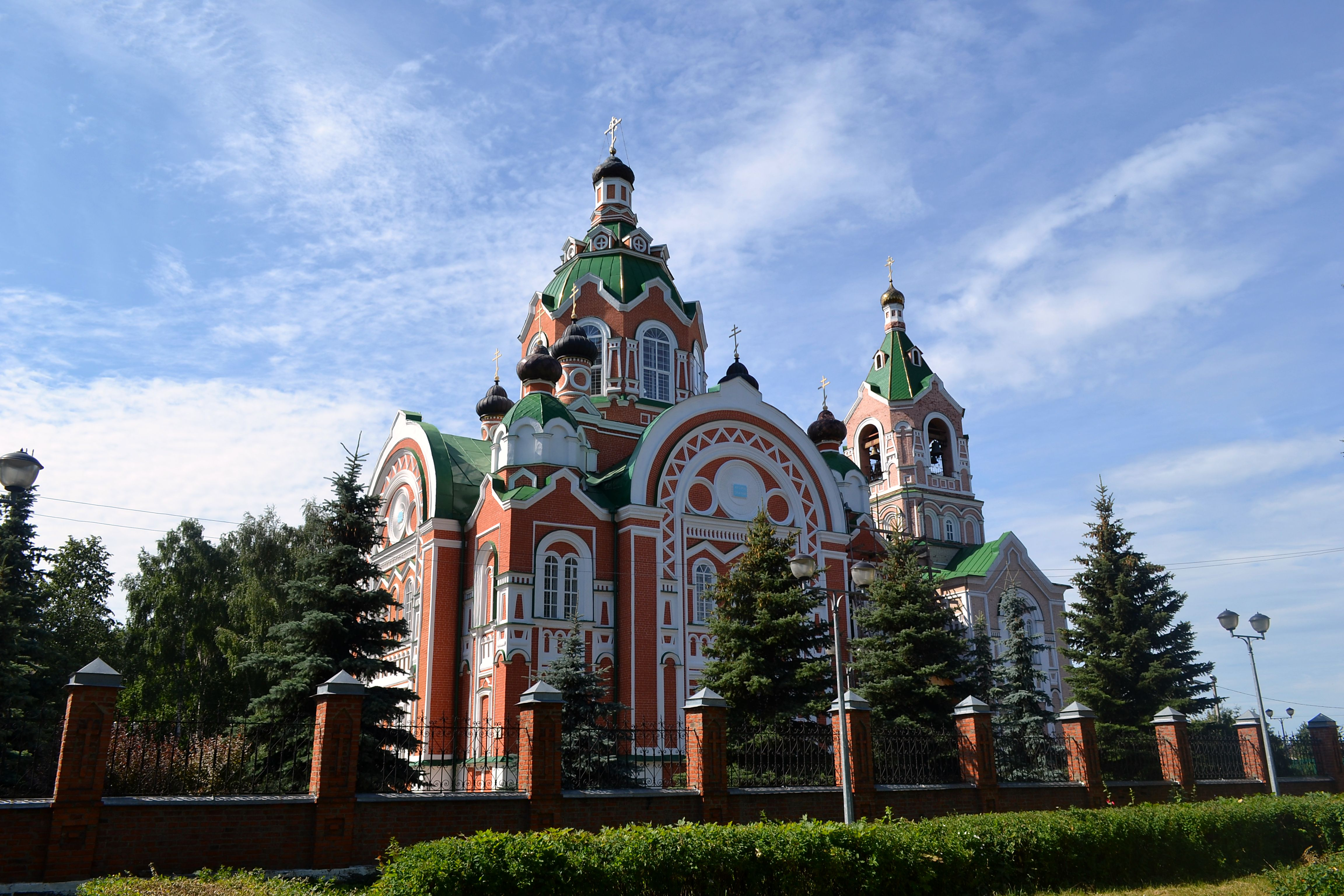 Михайло-Архангельская церковь: Юрино, Юринский район, Марий Эл